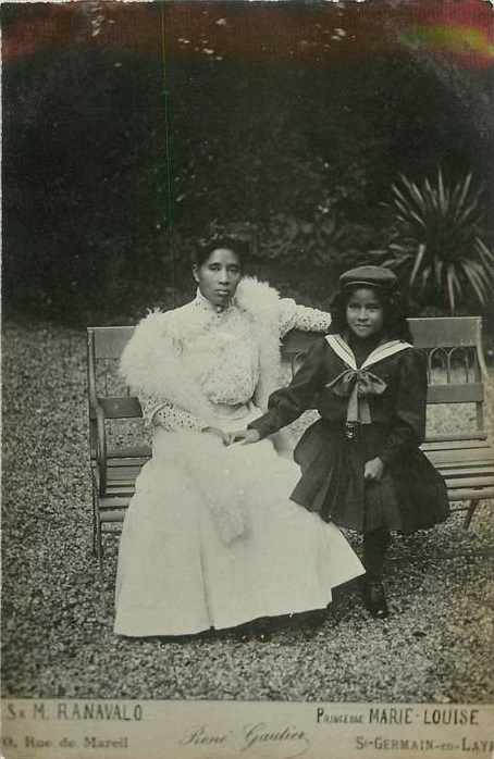 S. M. Ranavalona, la petite princesse Marie-Louise, photographe René Gautier rue de Mareil à Saint-Germain-en-Laye.